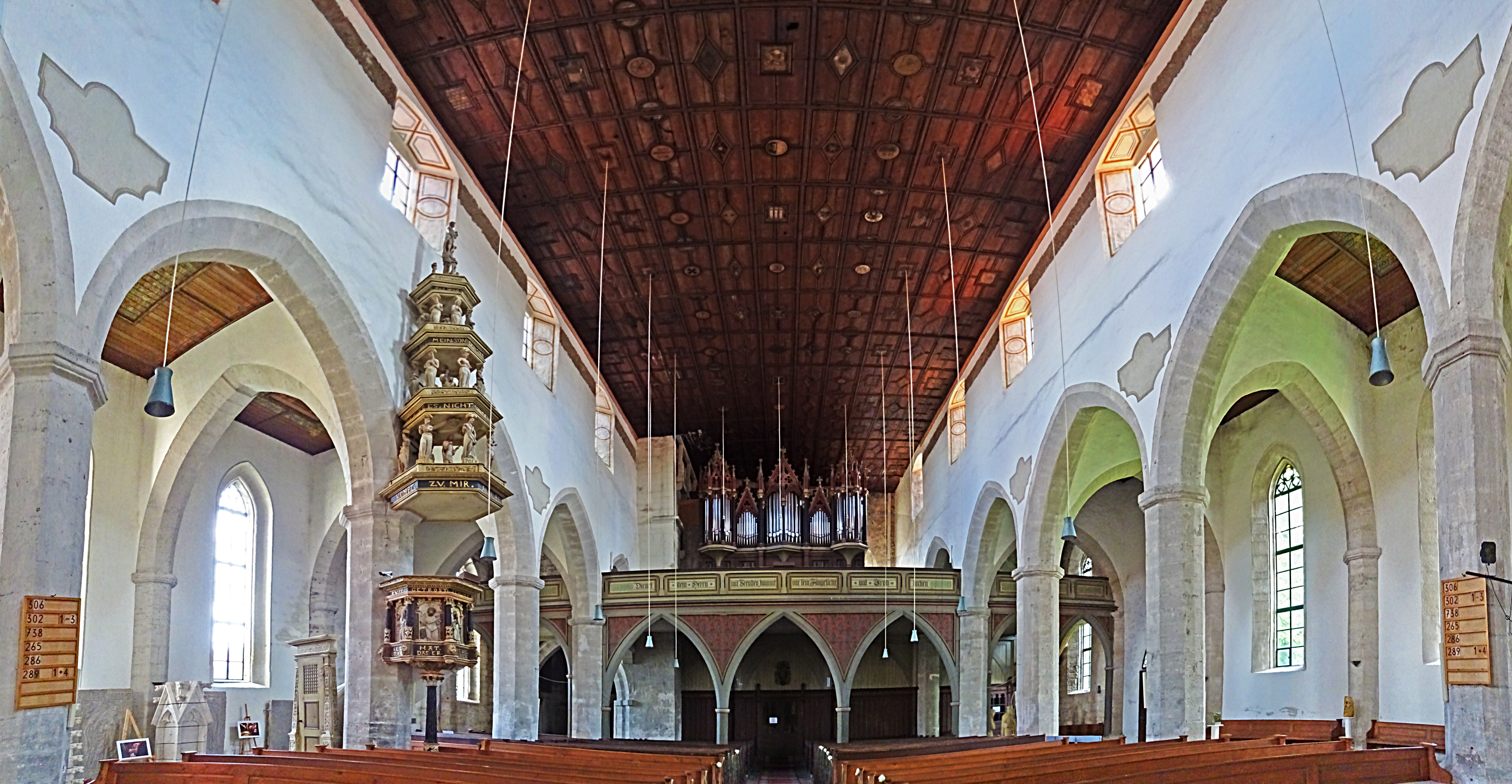 Innenraum Panorama Bergkirche St. Stephani (Langensalza)